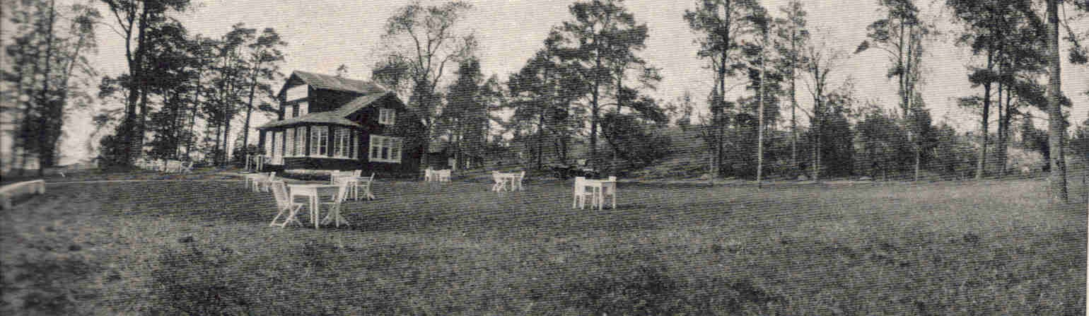 Fiskartorpsparken in Munkkiniemi, Helsinki, Finland in 1915 (Today Sigurd Steniuksen puisto?)